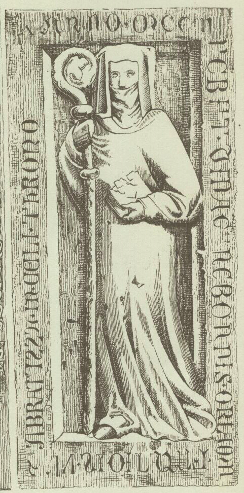 Bildunterschrift: Cunegunde Gräfin von Orlamuende / geborne Landgräfin von Leuchtenstein / Äbtissin von Himmelthron / gest. nach 1378 / in Himmelthron bei Grindelach